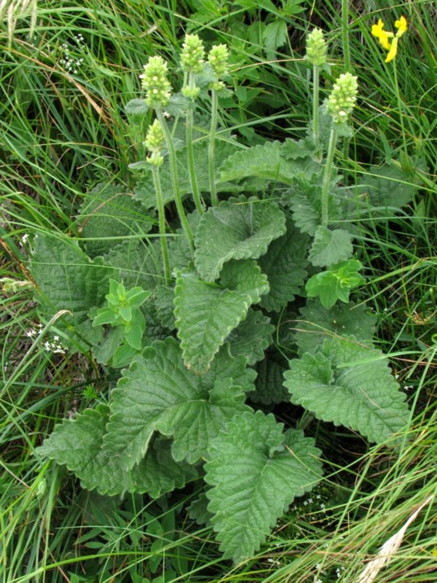 Jacquinov čistec na Poreznu (pod vrhom).